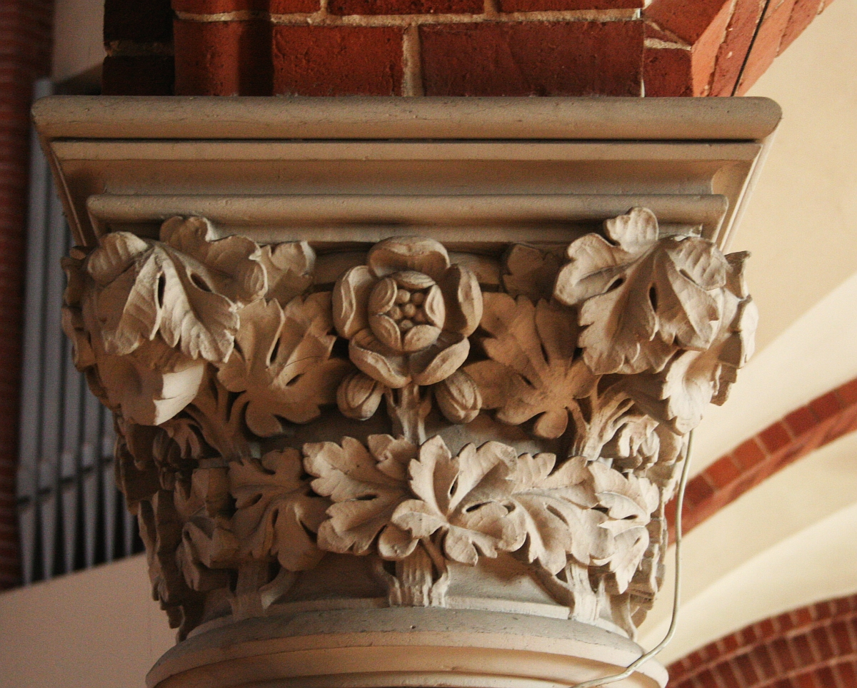 Kapitell im Inneren der Reformationskirche in Berlin-Moabit.